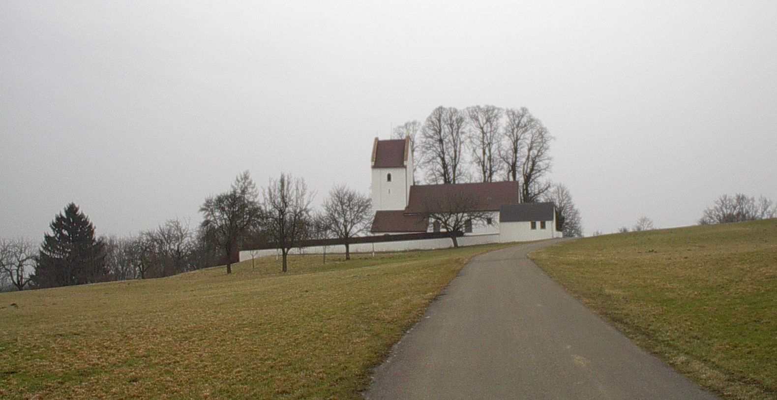 Die Heilig-Kreuz-Kirche von Joshofen auf einem Hügel.